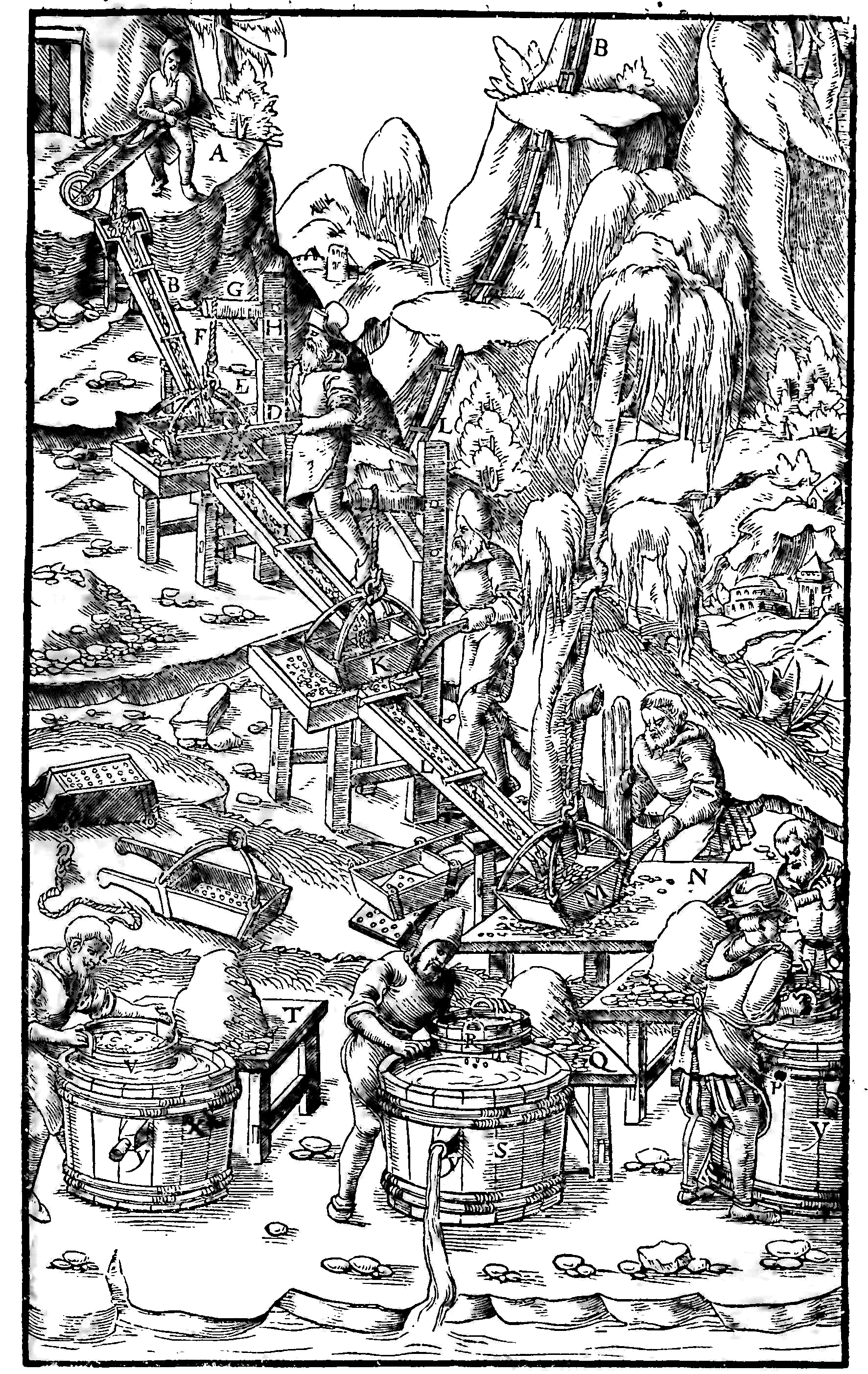 Incisione da De re metallica di Georg Agricola, Basilea, 1556